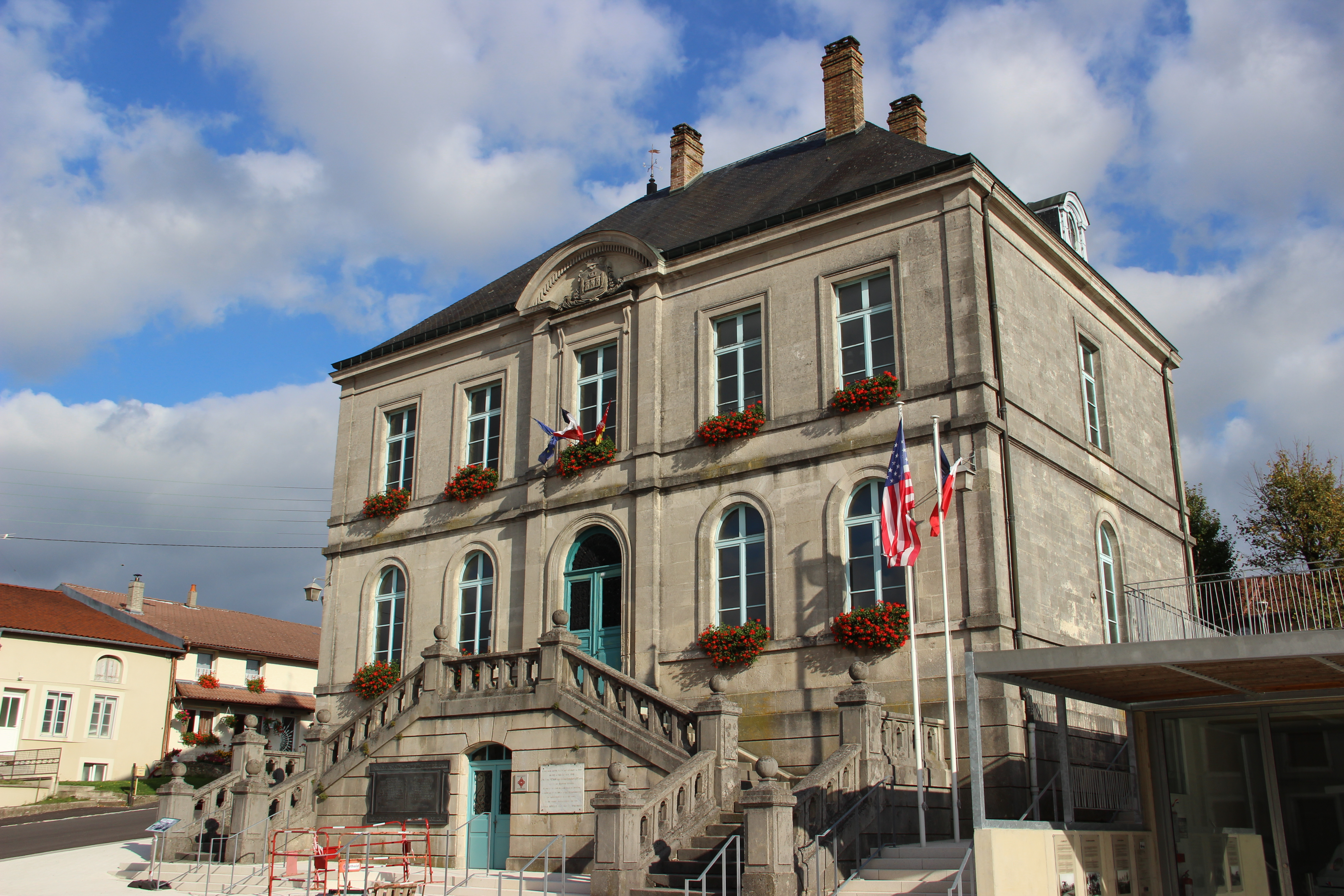 La mairie